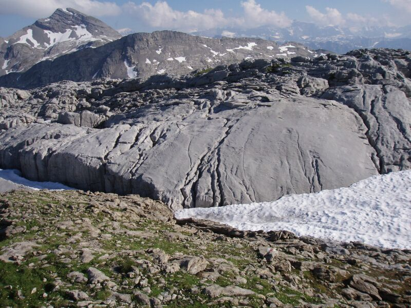 Kalkplatten auf der Silberen (Kanton Schwyz), im Hintergrund der Pfannenstock